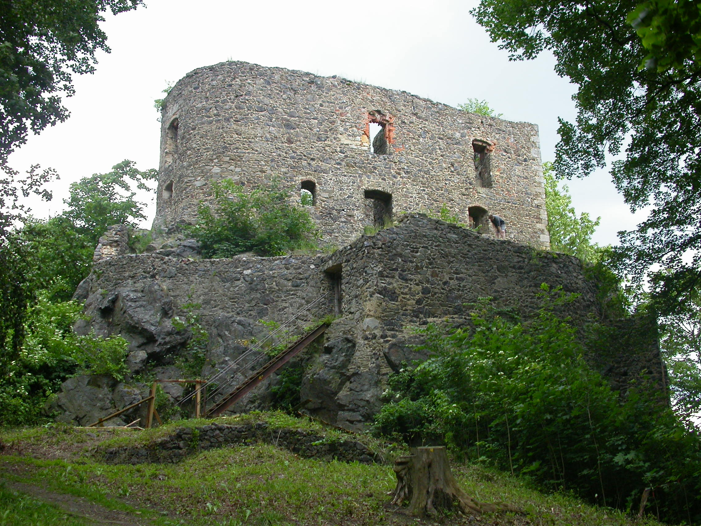 Castle Vlčtejn, Plzeňský kraj, Czech Republic